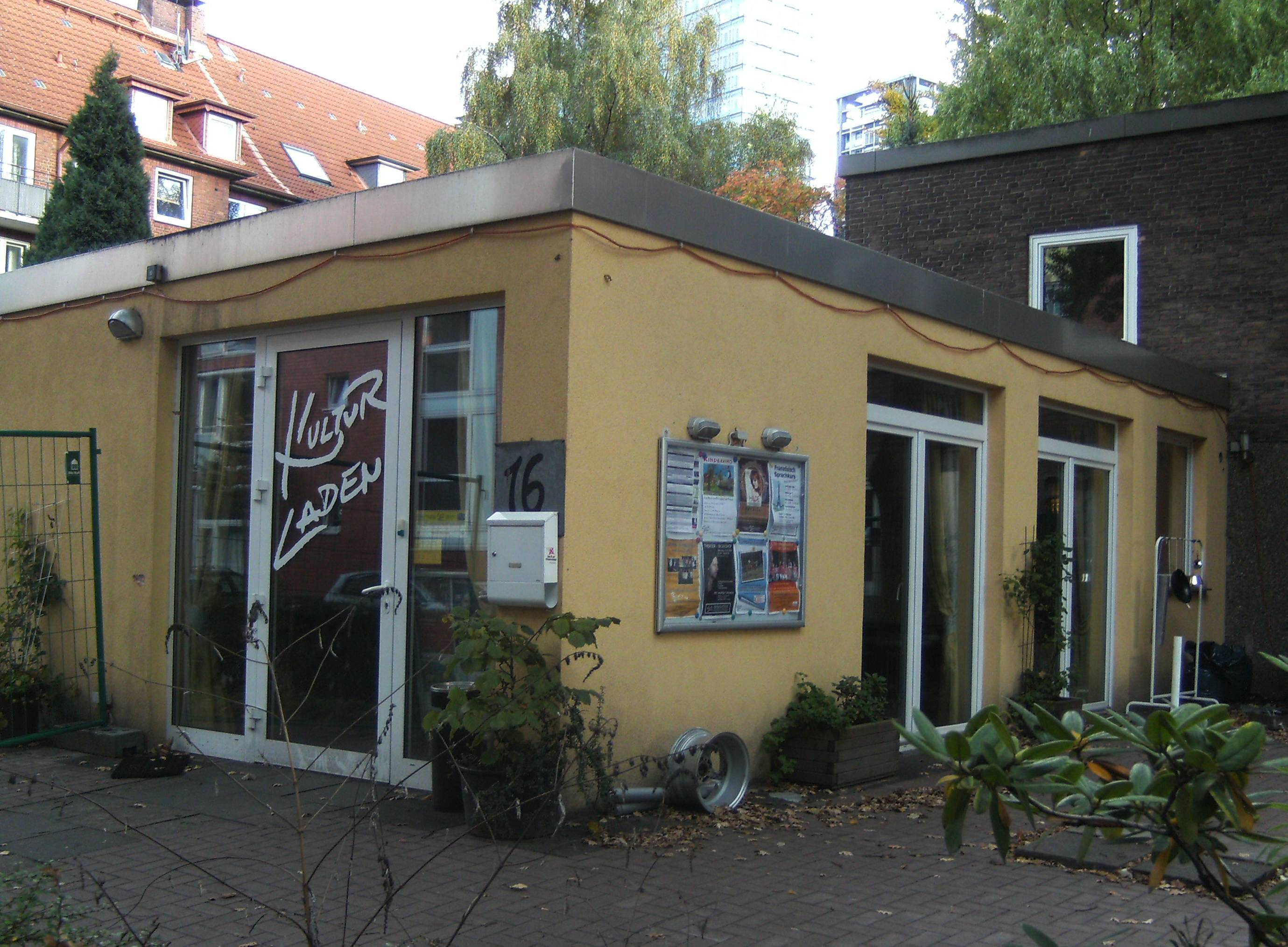 Kulturladen St. Georg in Hamburg am 16. Oktober 2010, kurz vor dem Umbau